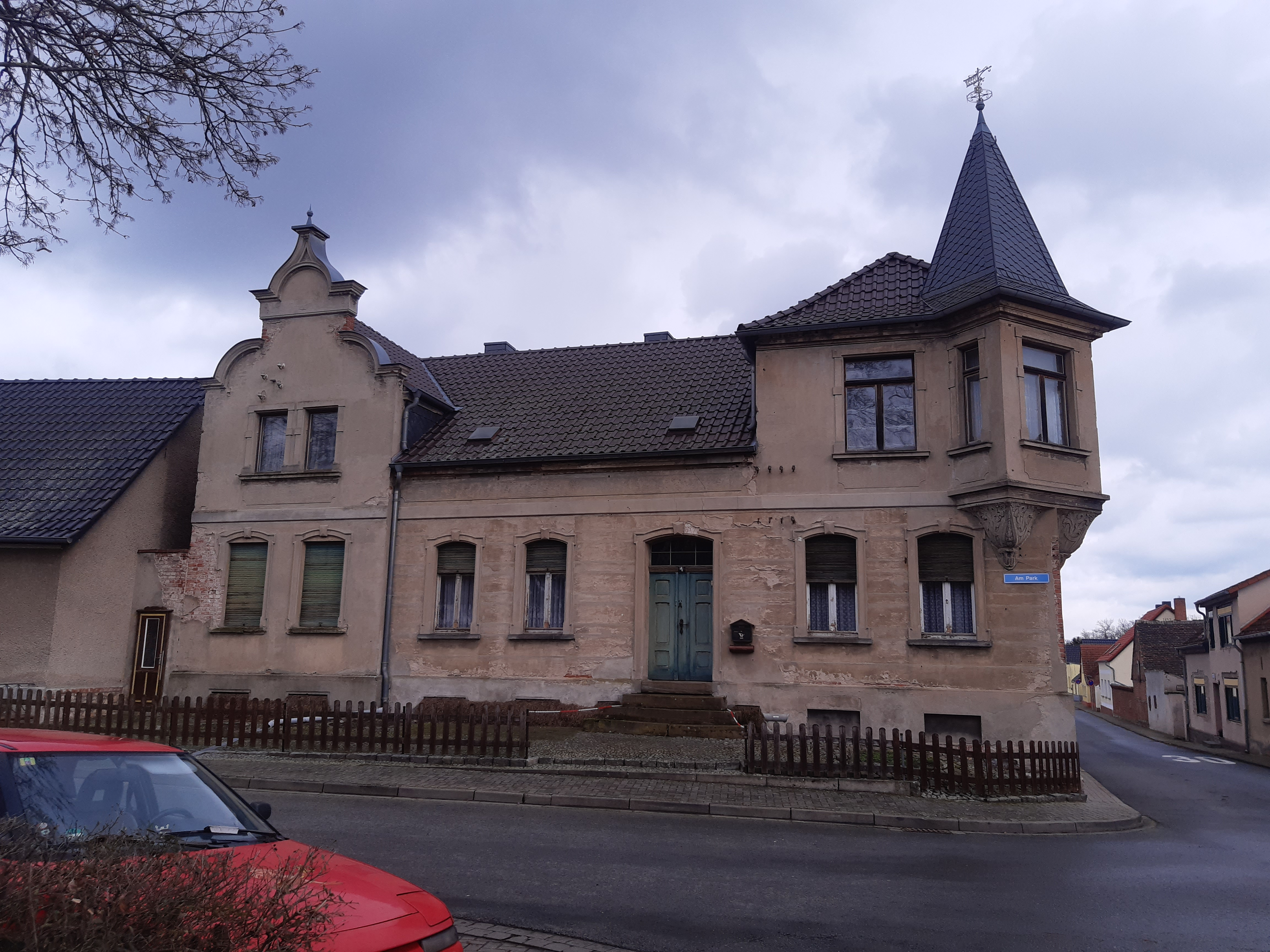 Wohnhaus